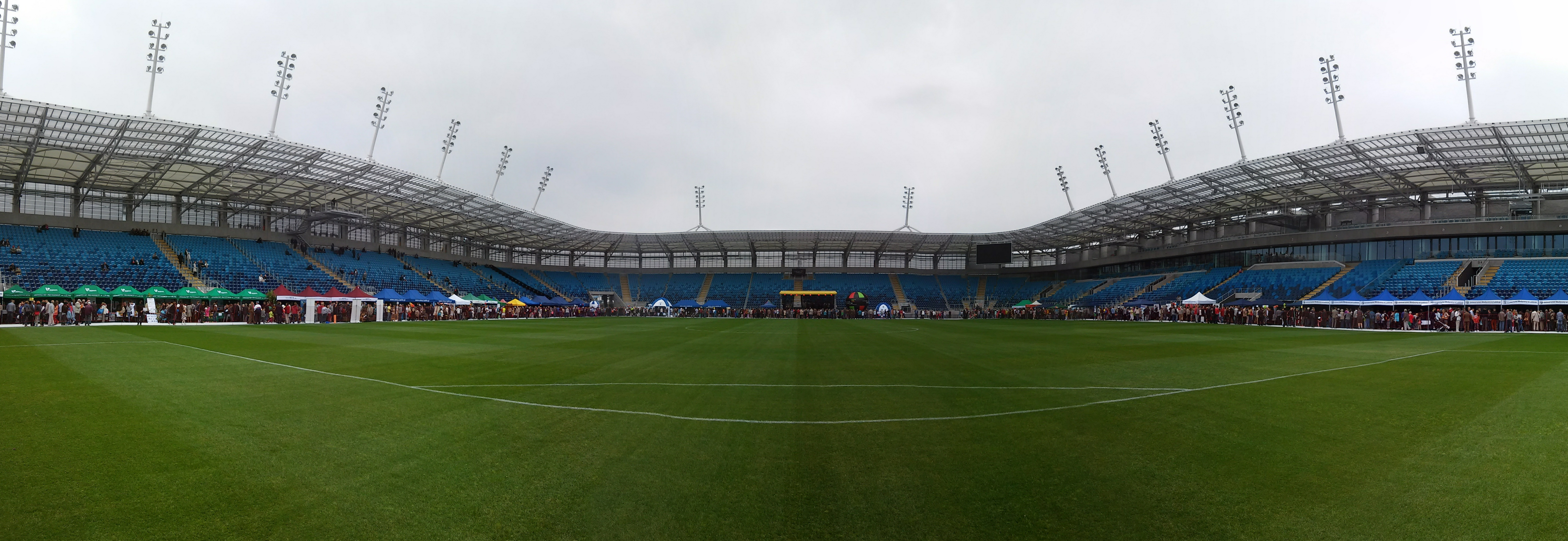 Arena Lublin podczas XI Lubelskiego Festiwalu Nauki.